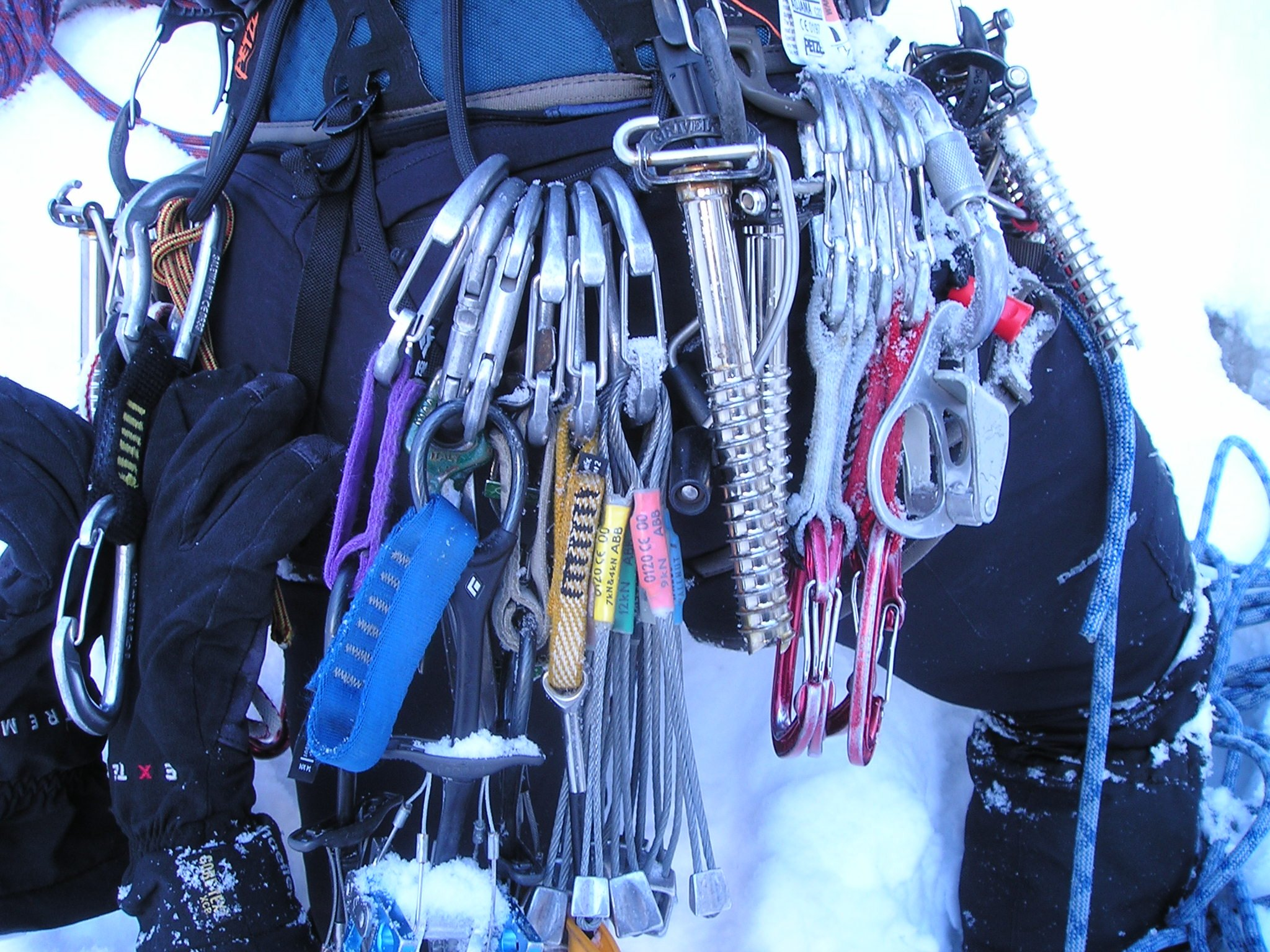 Ausrüstung zum Eisklettern